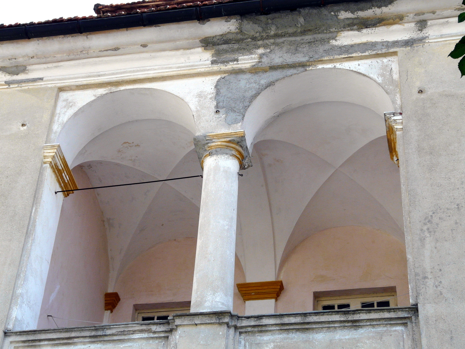 Palazzo dei Fieschi, di proprietà privata, Crocefieschi, Liguria, Italia